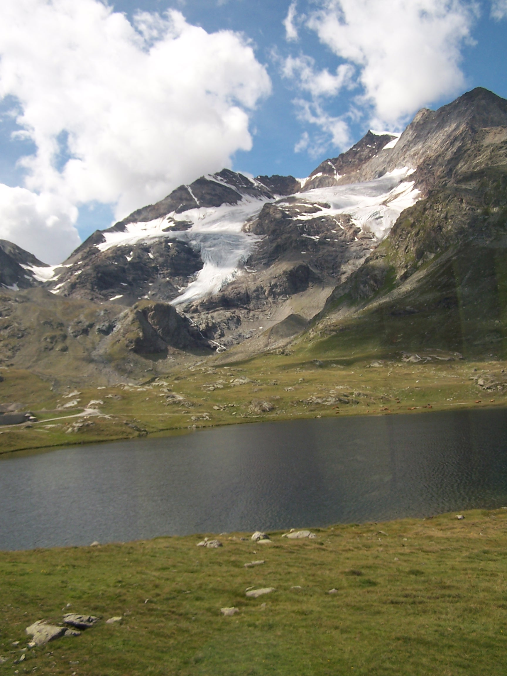 Lej Nair, Switzerland